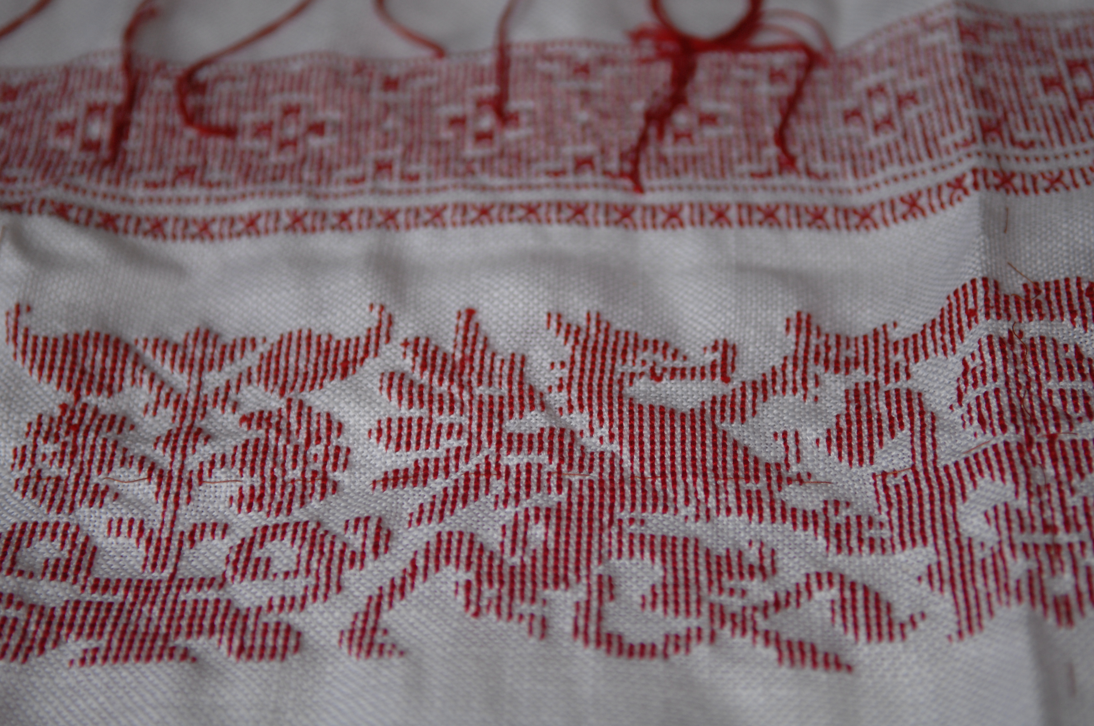 Kreuzstich Rueckseite